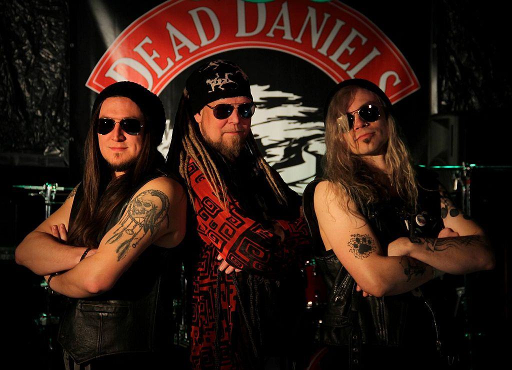 Dead Daniels - promo foto 2018